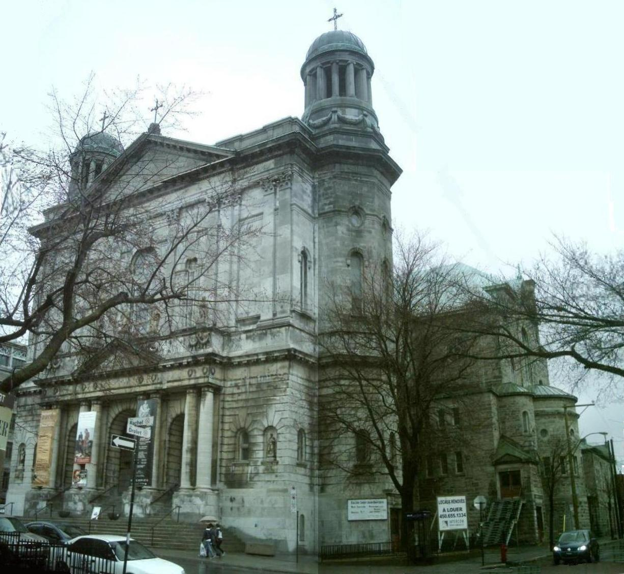 L'Église Saint-Jean-Baptiste de Montréal, sur la rue Rachel, à l'angle de la rue Drolet